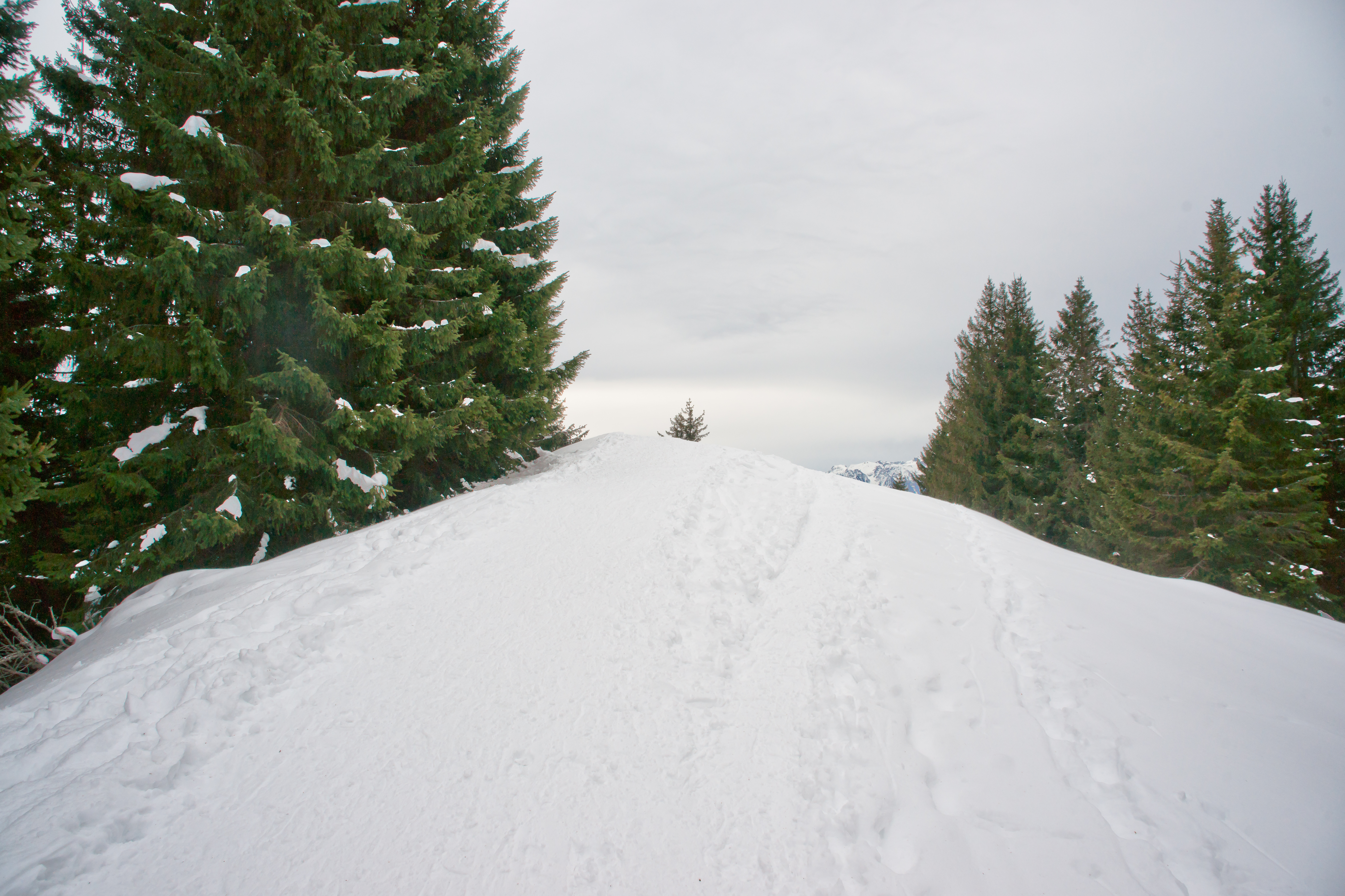 La Corbetta, sommet des préalpes en Suisse.